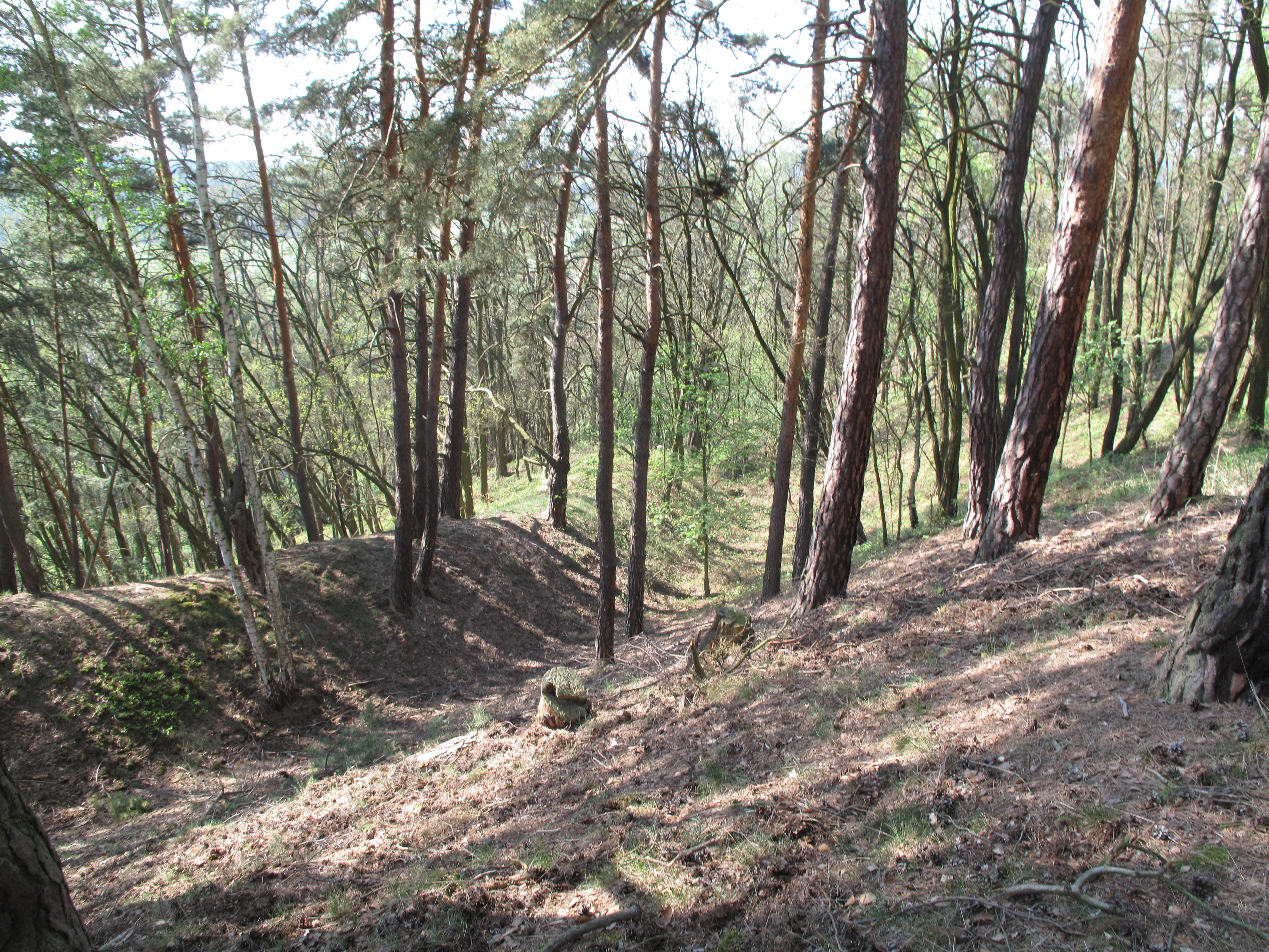 Zřícenina Hlavačov (ta u Rakovníka)